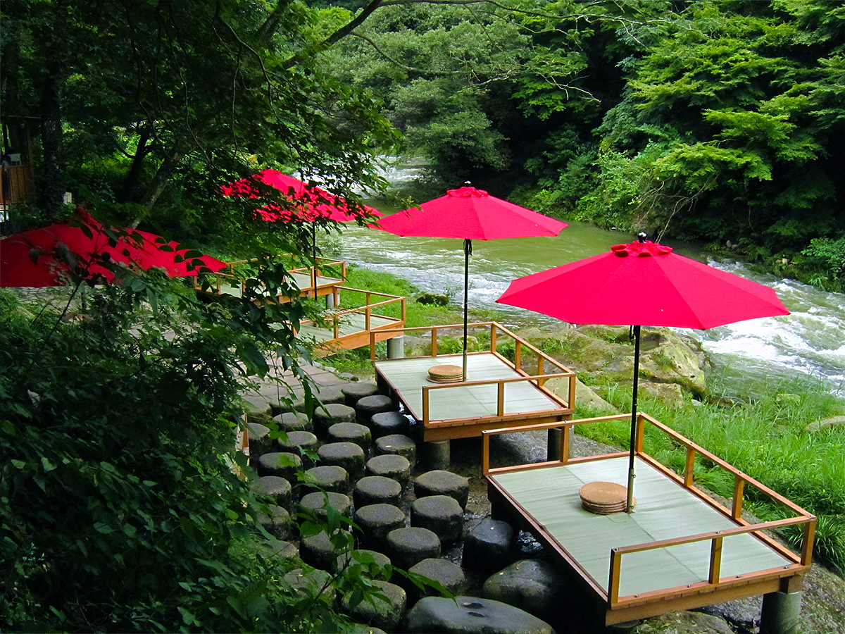 鶴仙渓川床 (Kakusen gorge) 20 Aug, 2011